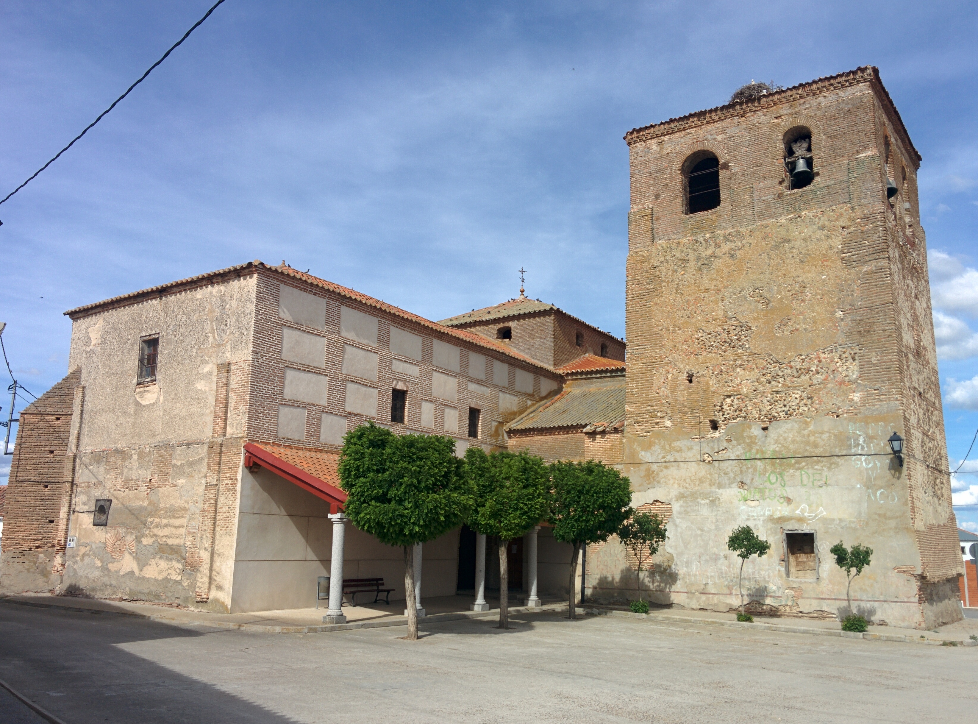 Iglesia de Santa María del Castillo, en Castellanos de Zapardiel (Ávila, España).